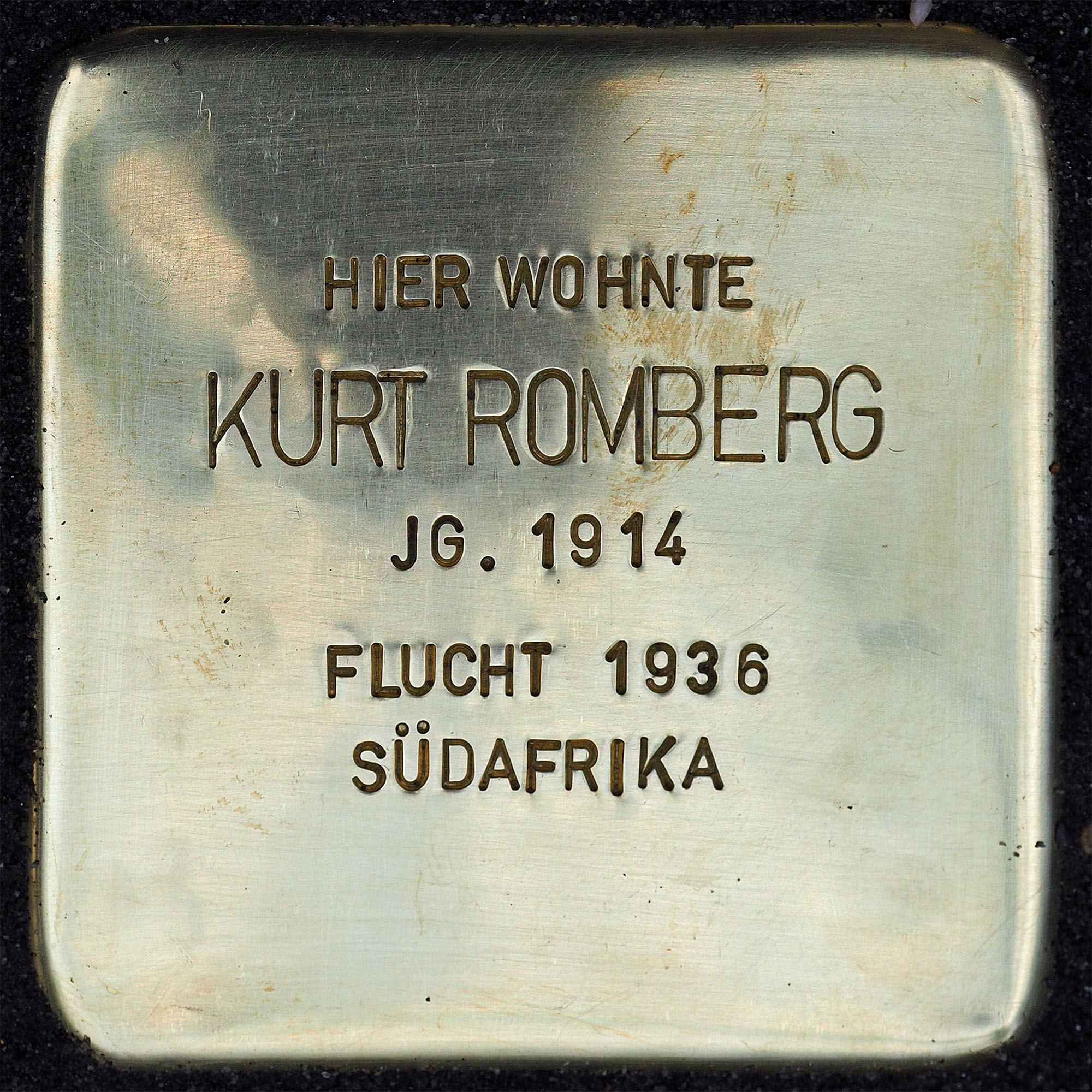 Stolpersteine in Tönisvorst: Kurt Romberg